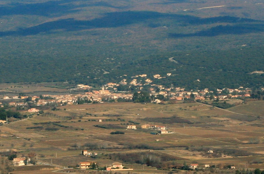 Vue générale de Villes-sur-Auzon depuis Blauvac, France